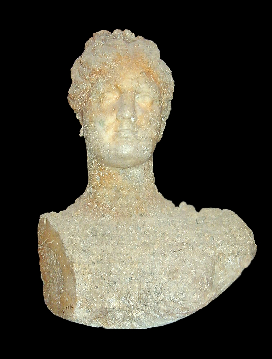 Buste d'Aphrodite, fouilles de Mahdia (Tunisie)